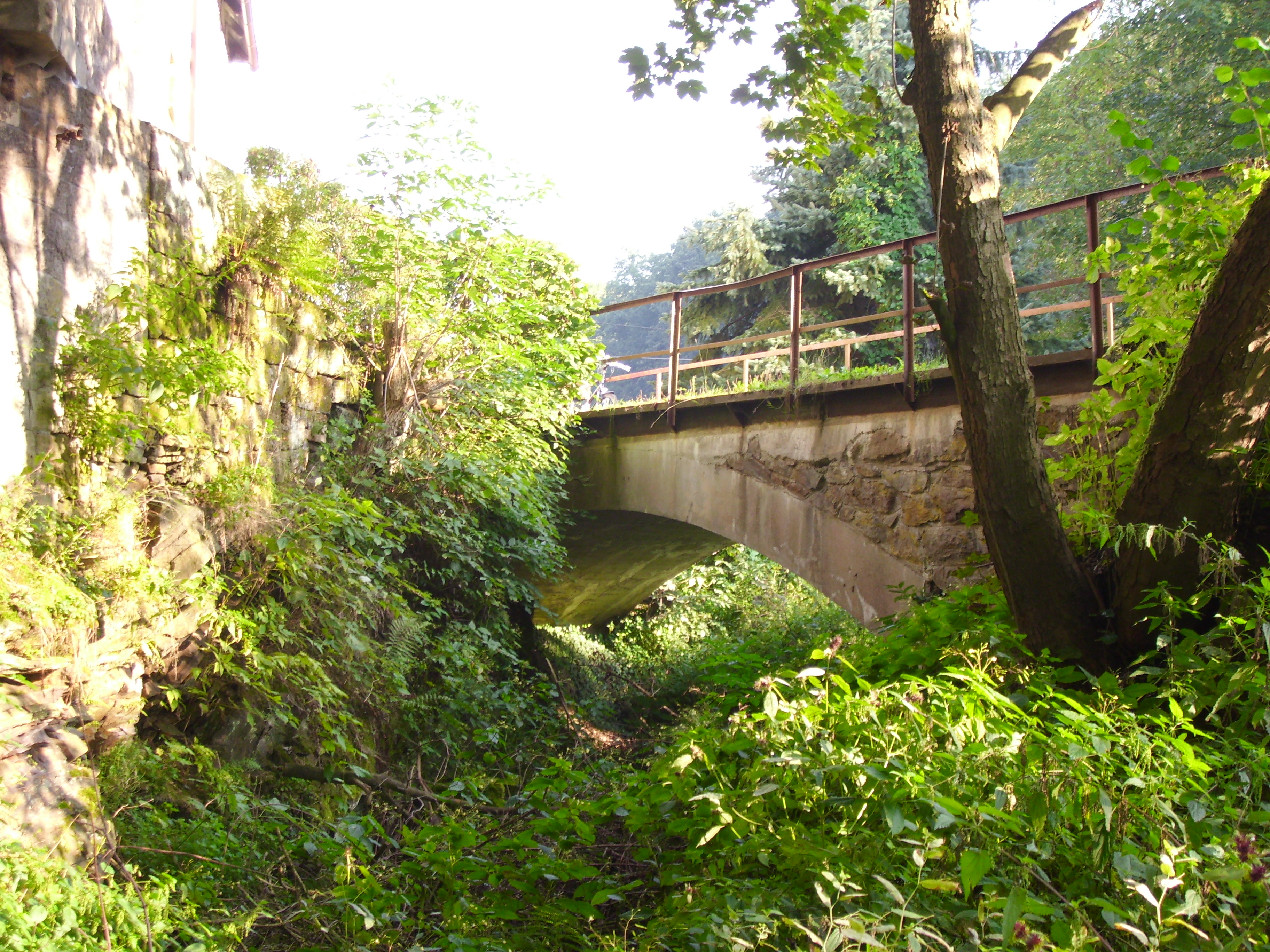 Die Brücke in Seifersdorf war die erste Segmentbogenbrücke aus Stampfbeton in Deutschkand und wurde 1882 für die Schmalspurbahn gebaut.